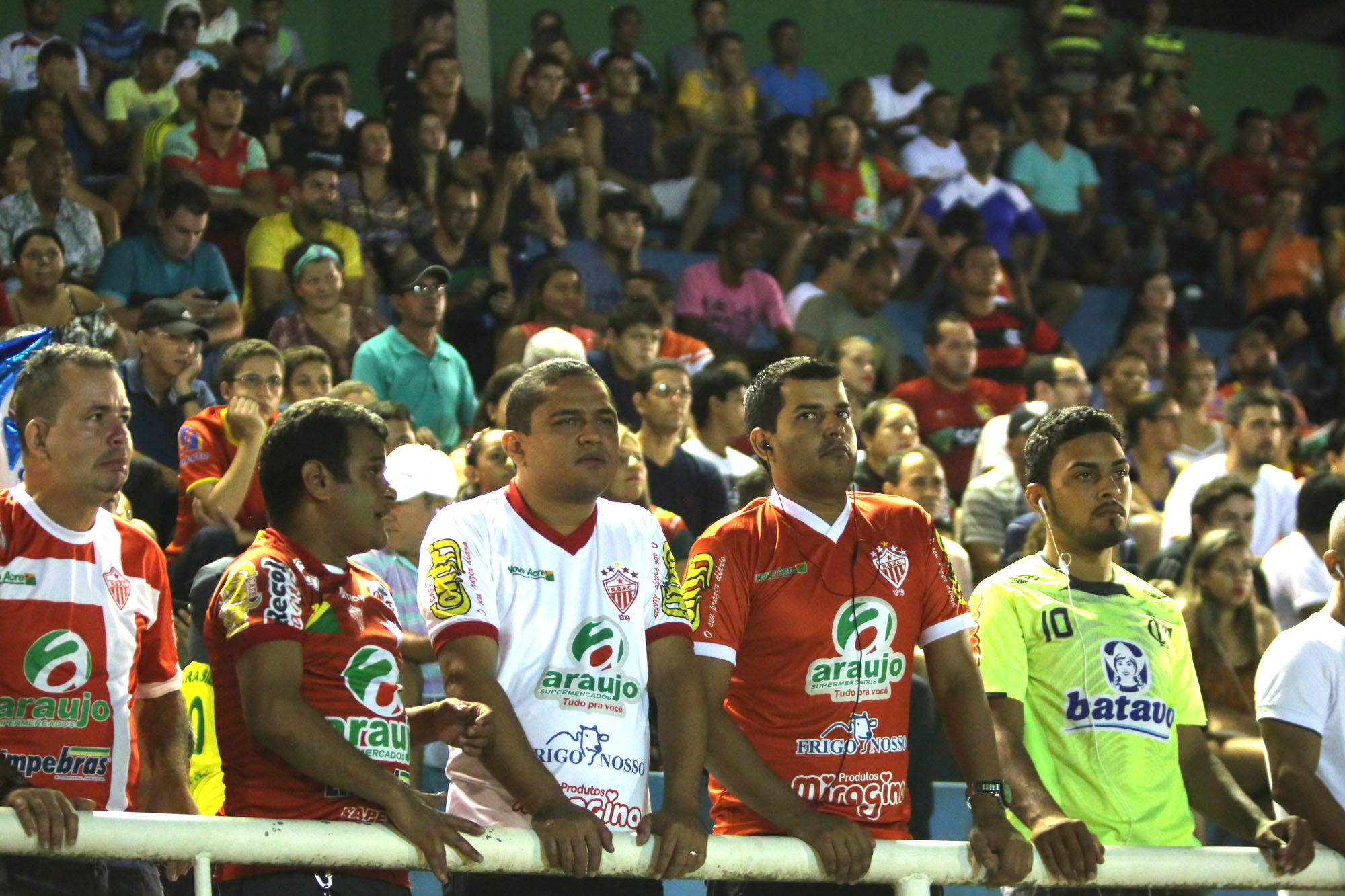 Foto: Sérgio Vale/Secom